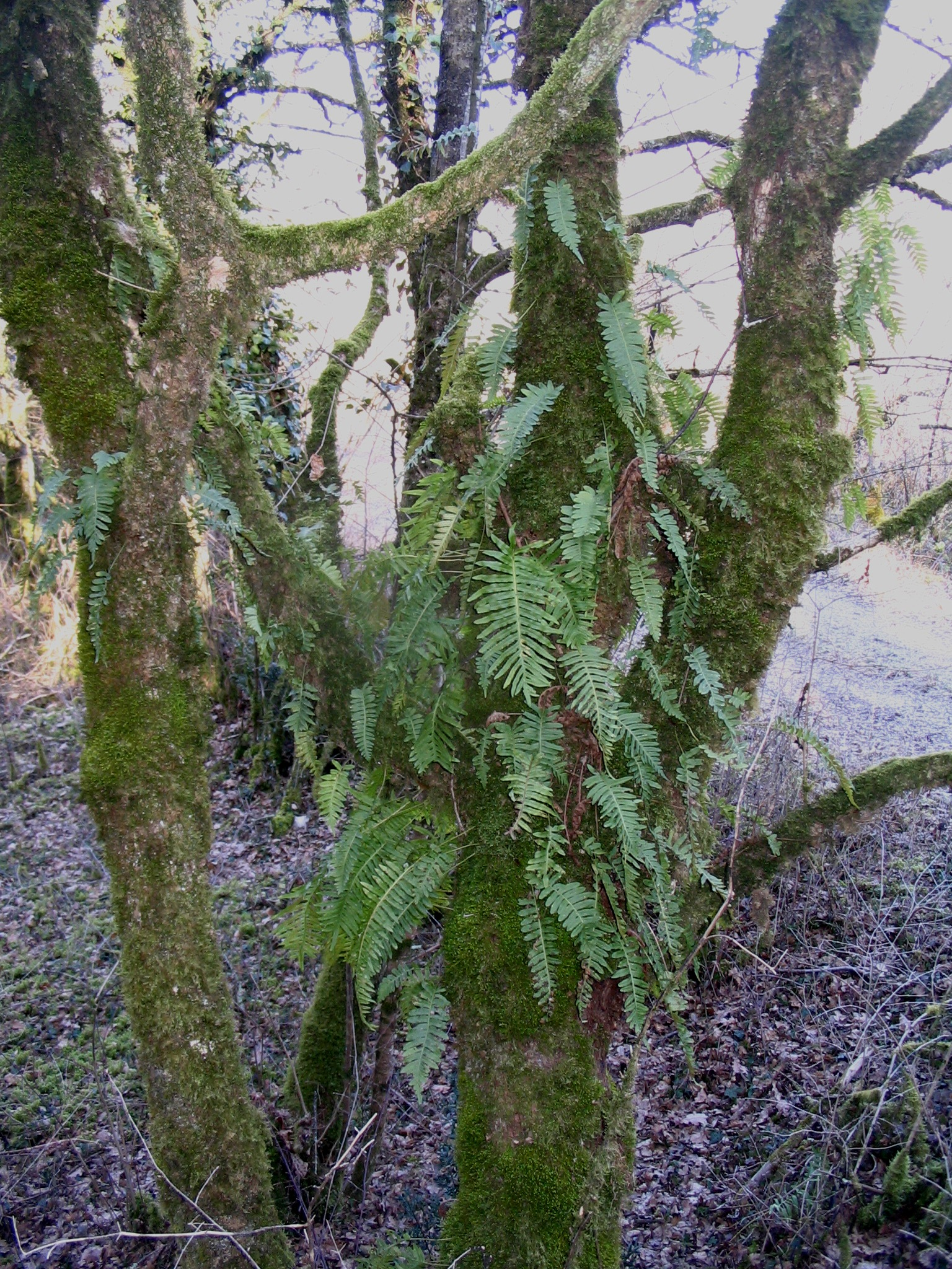 Polypode commun, Polypodium vulgare (épiphyte)- Brégnier-Cordon - Ain - France